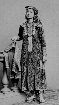 Salma bent Said bin Sultan (Emily Ruete)